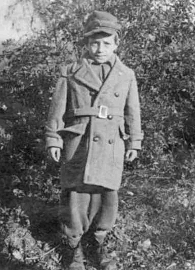 Боре Ангеловски на шест годишна возраст